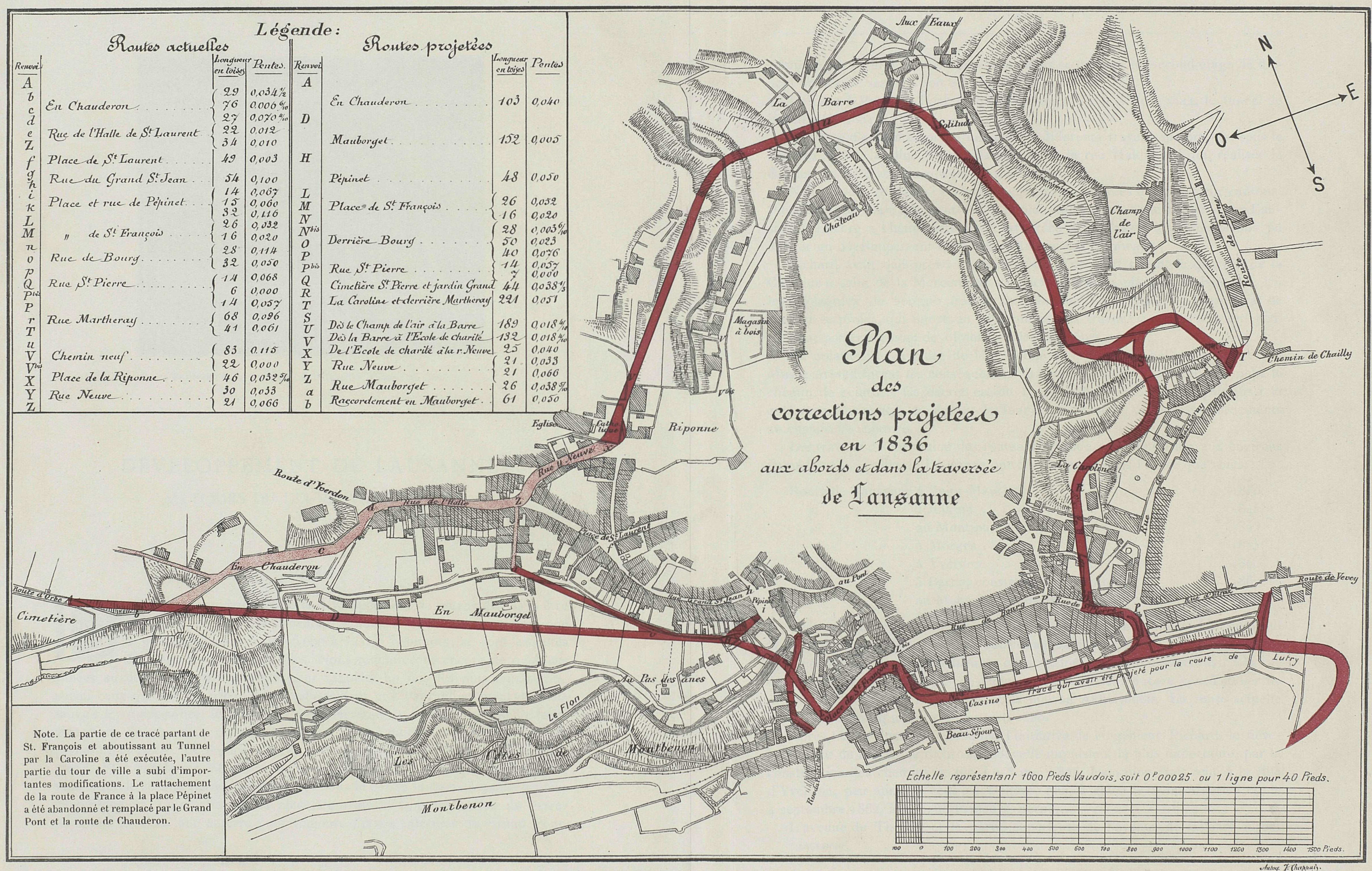 Illustration de l'ouvrage Lausanne à travers les âges publié en 1906 par la municipalité de Lausanne. Page 106.